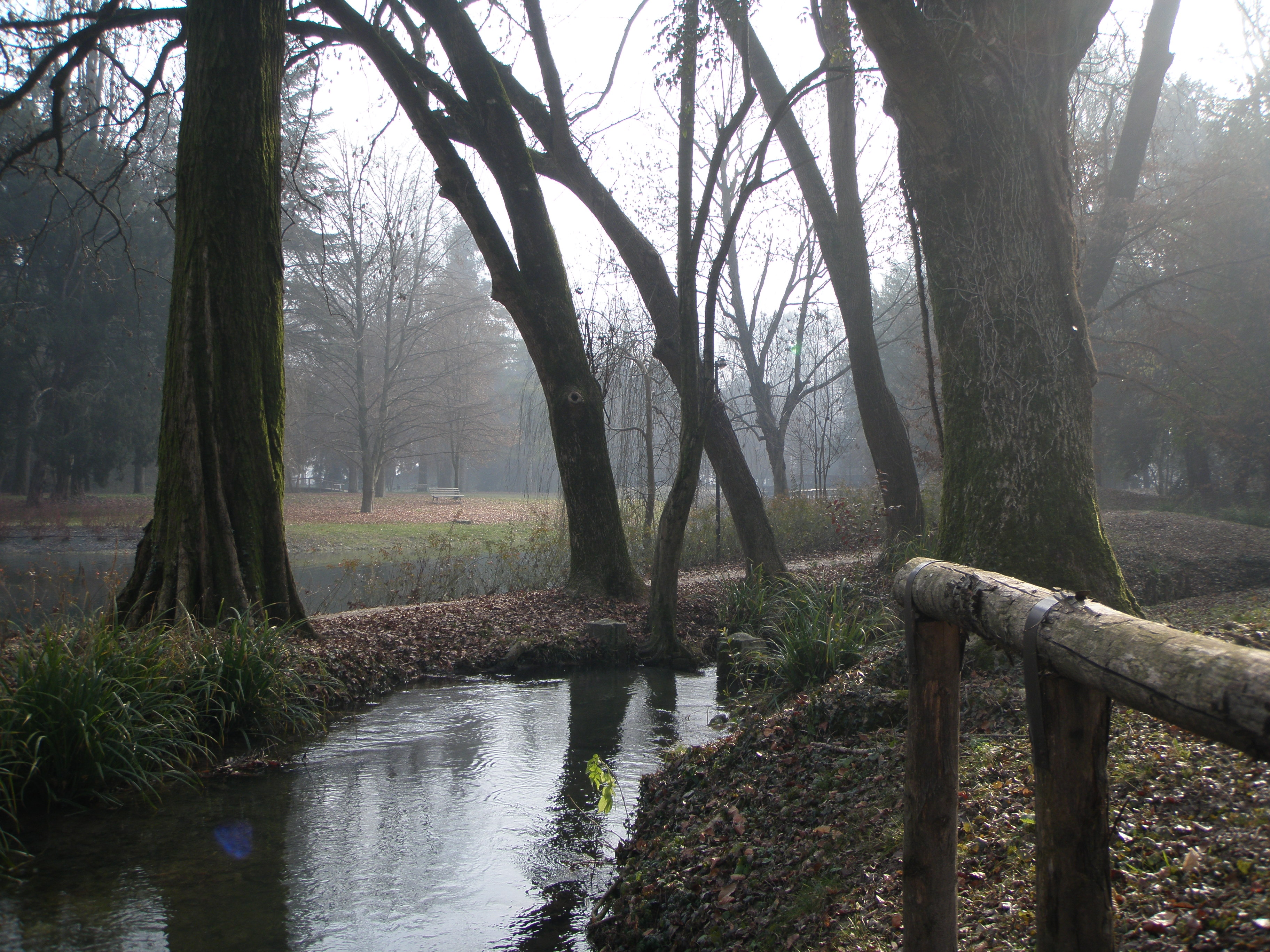 vista di villa capello - lago